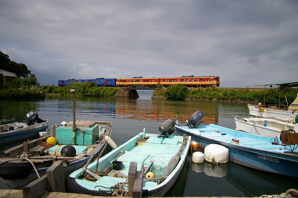 JR Kyushu Omura Line